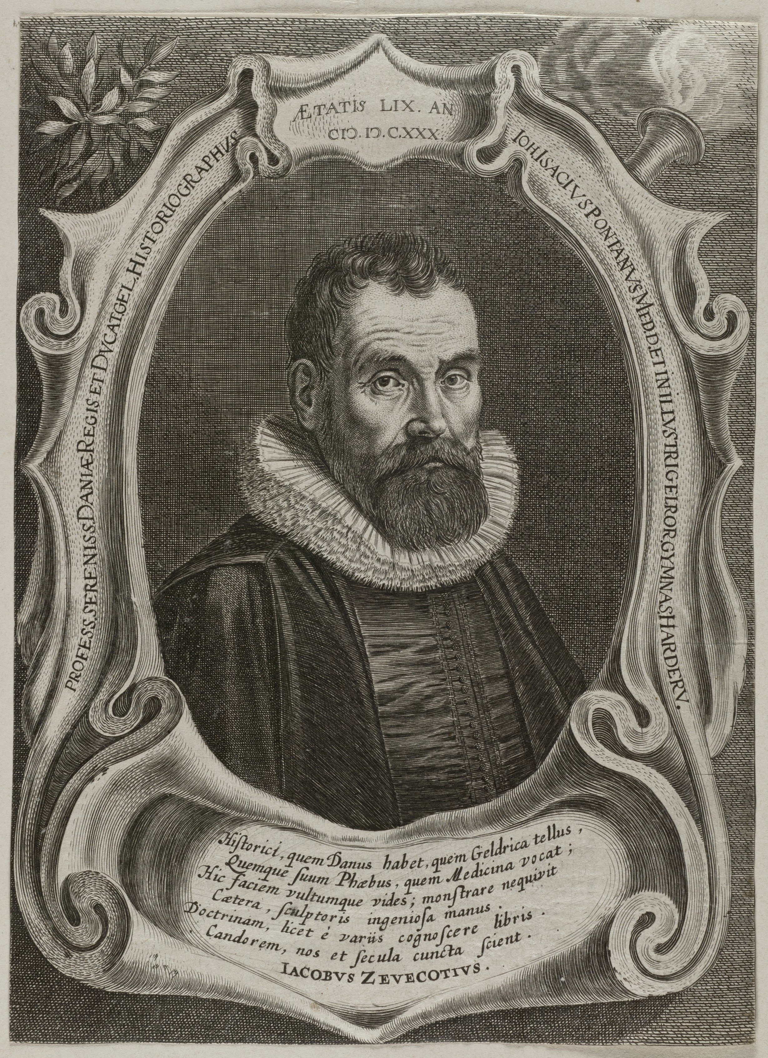 CollectieVoorhelm SchneevoogtInventarisnummerNL-HlmNHA_53012626BeschrijvingPortret van professor Johannes Isacius Pontanus op 59-jarige leeftijd.Met zesregelig Latijns gedicht door Jacobus Zevecotius.FotonummerNL-HlmNHA_53012626DocumenttypePortrettenVervaardigerVelde, Jan van de (II) (1593-1641), Zevecotius, Jacobus (1596-1642) PersonenPontanus, Johannes Isacius (1571-1639) LandNederland ProvincieNoord-Holland GemeenteHaarlem PlaatsHaarlem Begindatum1630Einddatum1630TechniekGrafiek Drukwerk Trefwoordenartsen, medici, filosofen, professoren LiteratuurHollstein Dutch 406-3(3)